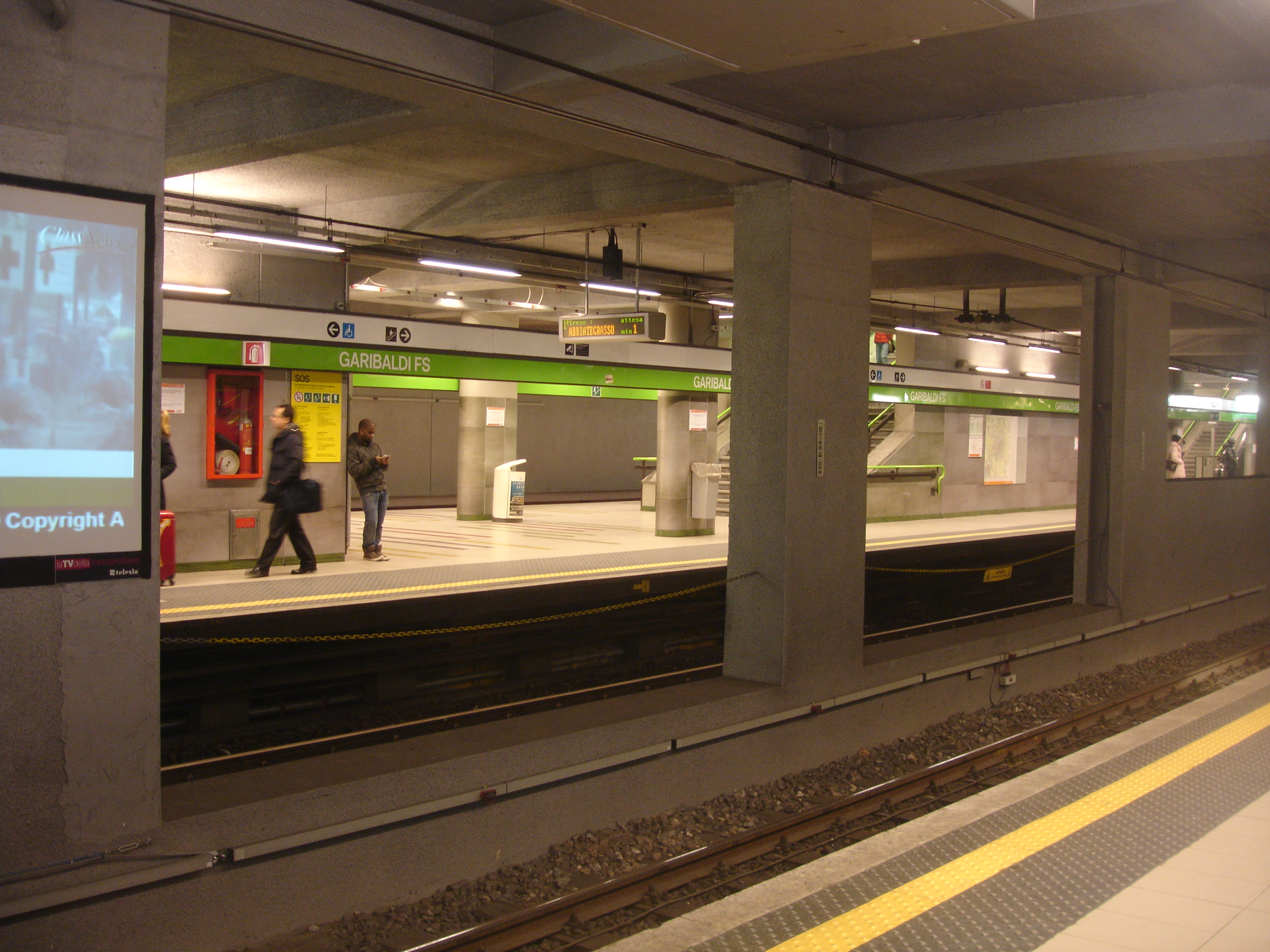 Una vista della stazione della Metropolitana Milanese di Garibaldi.